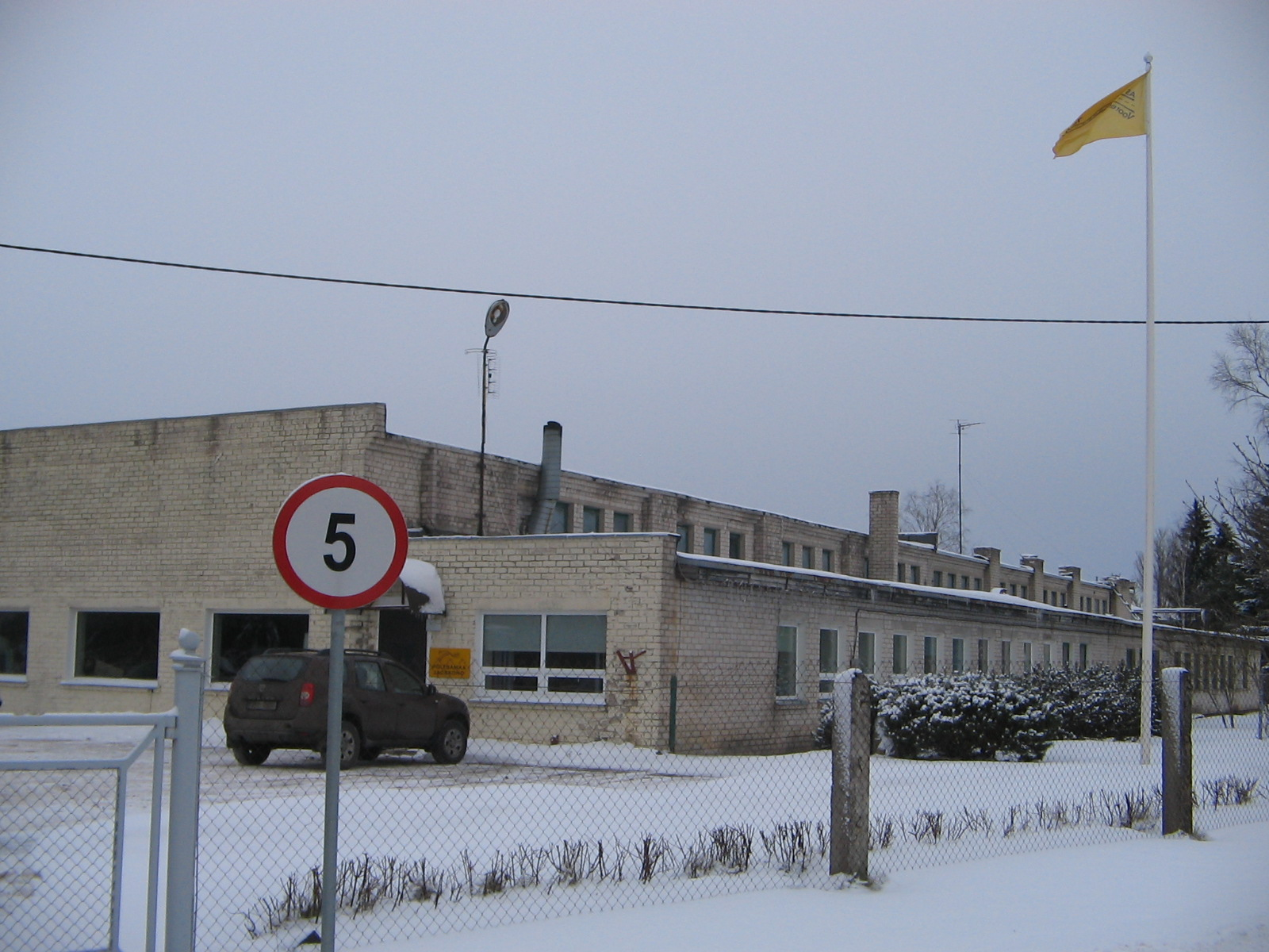 AS Vooremaa Teed, Põltsamaa jaoskond